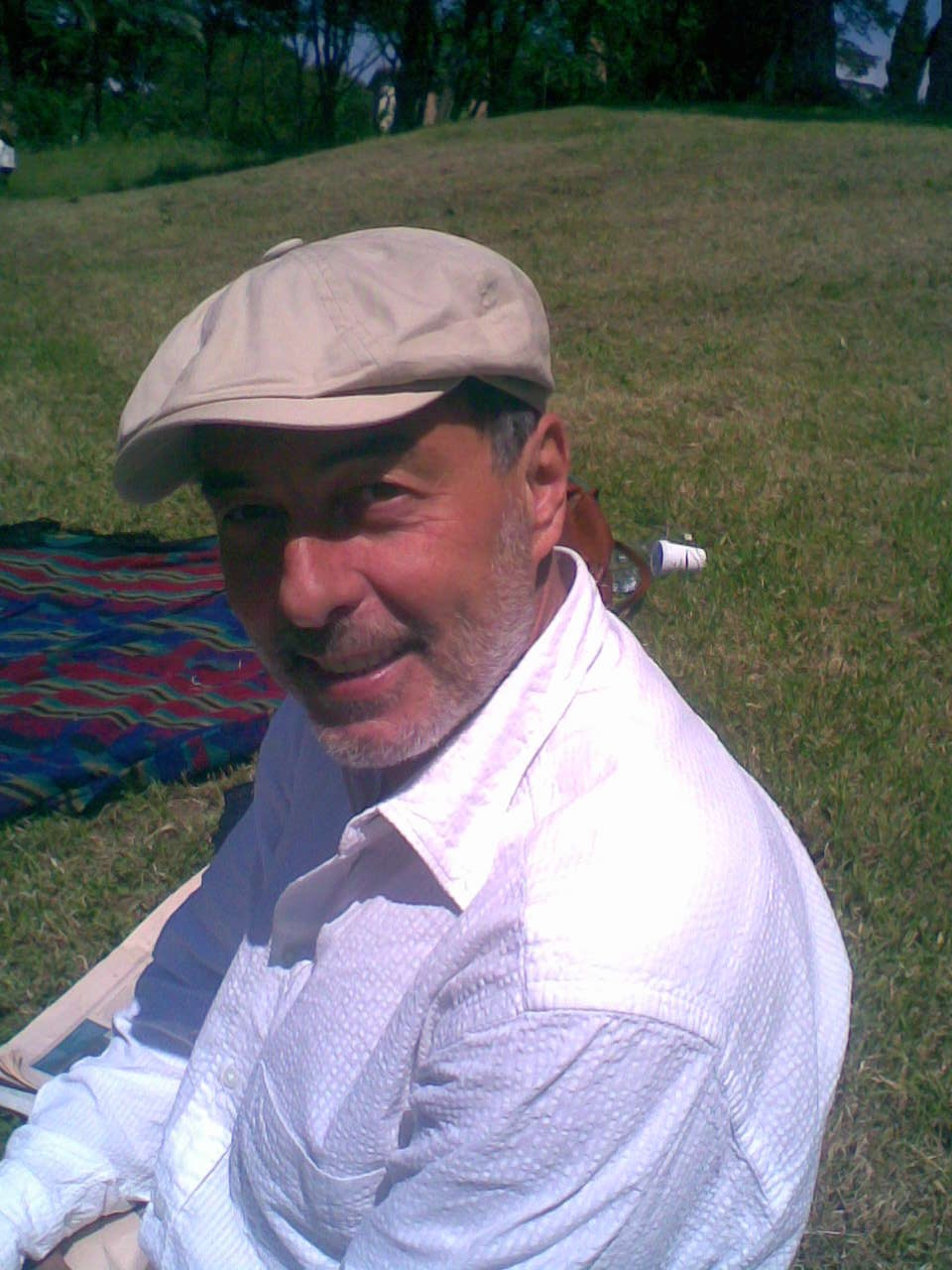 Immagine dell'attore italiano Bruno Armando, messa a disposizione dalla moglie Sabina Vannucchi